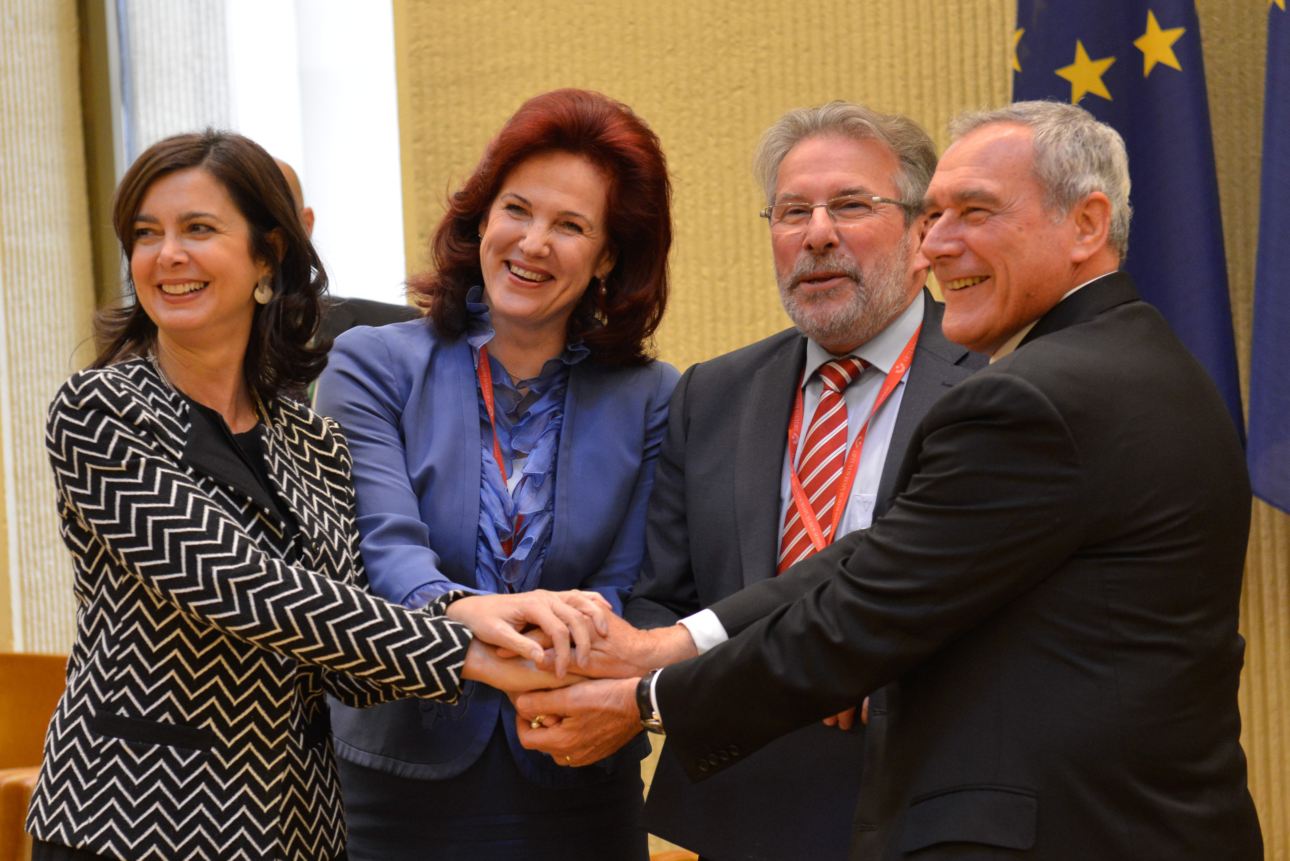 2014.gada 7.aprīlis. Saeimas priekšsēdētāja Solvita Āboltiņa, Itālijas Senāta prezidents Pjetro Grasso (Pietro Grasso), Itālijas parlamenta Deputātu palātas prezidente Laura Boldrini (Laura Boldrini) un Luksemburgas Deputātu palātas prezidents Marss di Bartolomeo (Mars di Bartolomeo) paraksta vienošanos par trio sadarbību prezidentūras ES Padomē ietvaros. Foto: Reinis Inkēns, Saeimas Kanceleja Izmantošanas noteikumi: saeima.lv/lv/autortiesibas